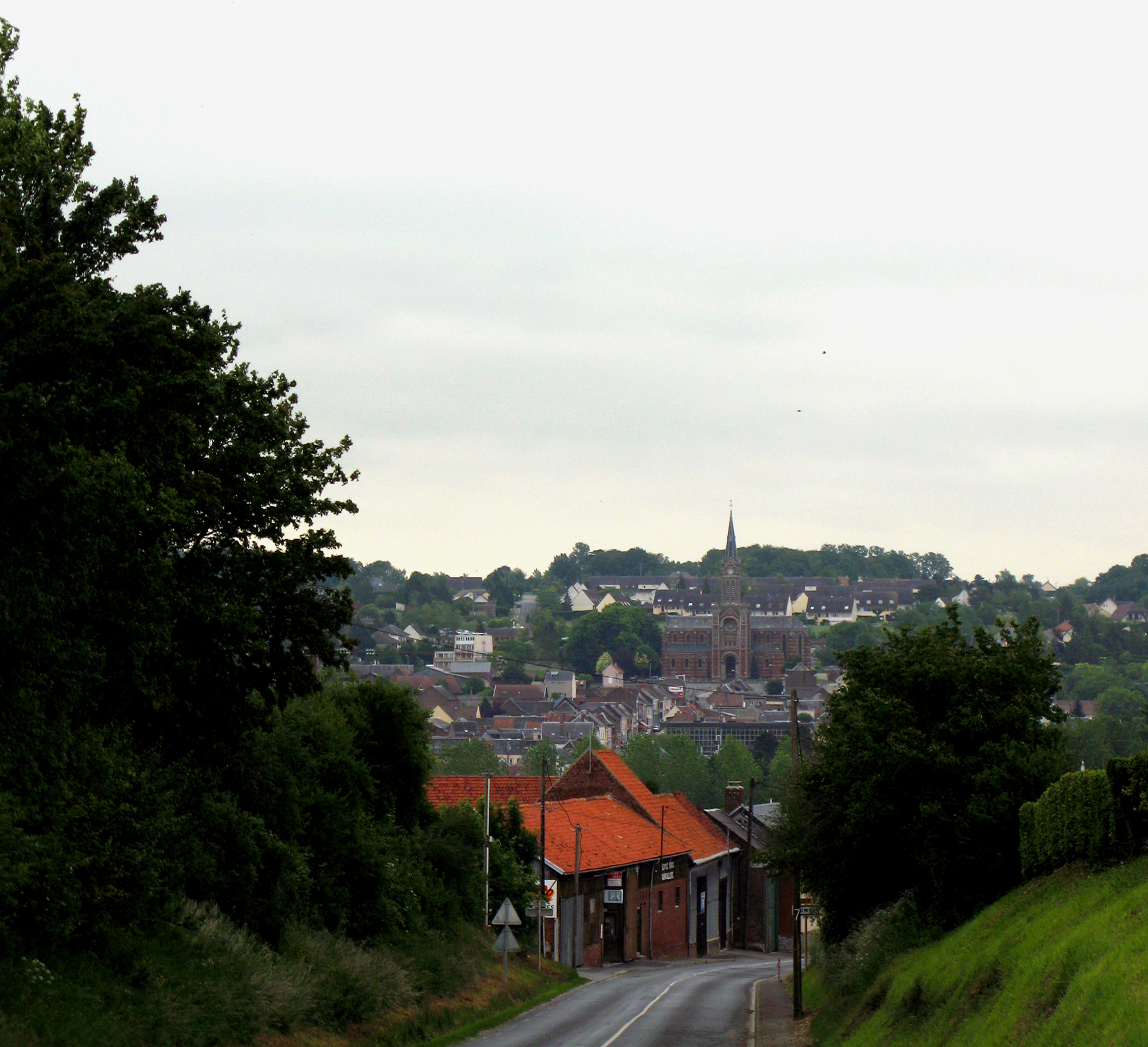 Ailly-sur-Noye (Somme, France) - Panorama depuis la descente vers Jumel (route départementale D7). On remarque : l'église, juste dans l'axe de la route départementale (en venant d'Amiens).